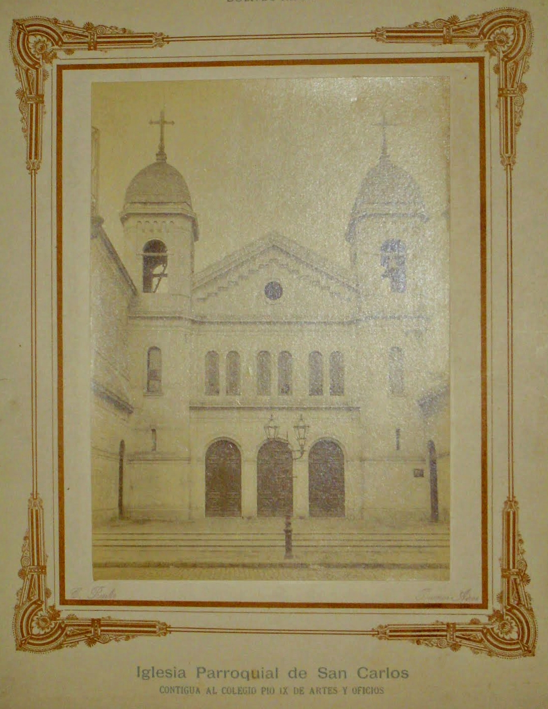 Antigua Iglesia parroquial de San Carlos Borromeo - Fines del siglo XIX